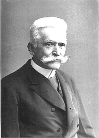 Sigmund Freiherr von Pfeufer (1824-1894), Innenminister des Königreichs Bayern